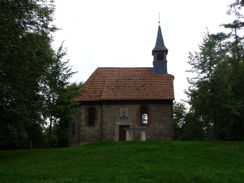 Die St.-Rochus-Kapelle in Worbis (Eichsfeld), direkt am Alternativen Bärenpark gelegen. Ihr Bau erfolgte nach der Pestepidemie 1682/83.